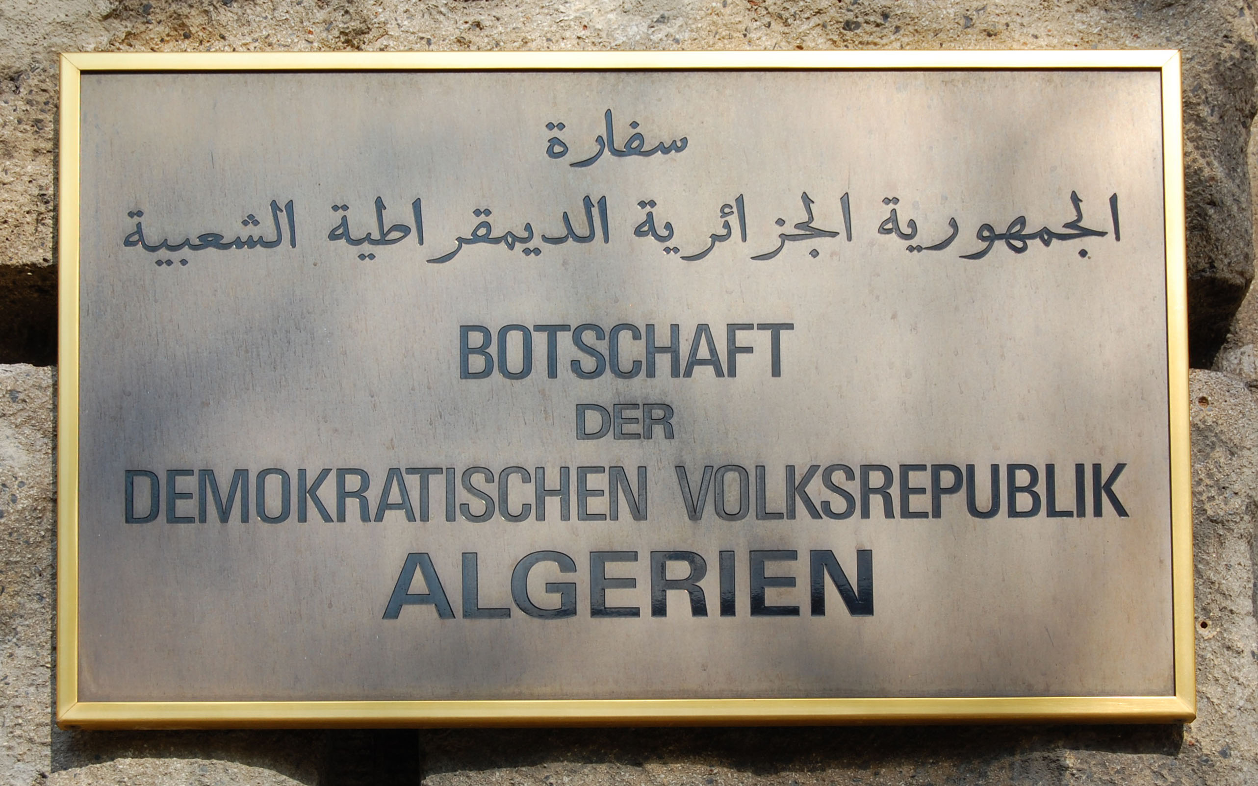 Embassy of Algeria in Berlin ( سفارة الجمهورية الجزاإرية الديمقراطية الشعبية )